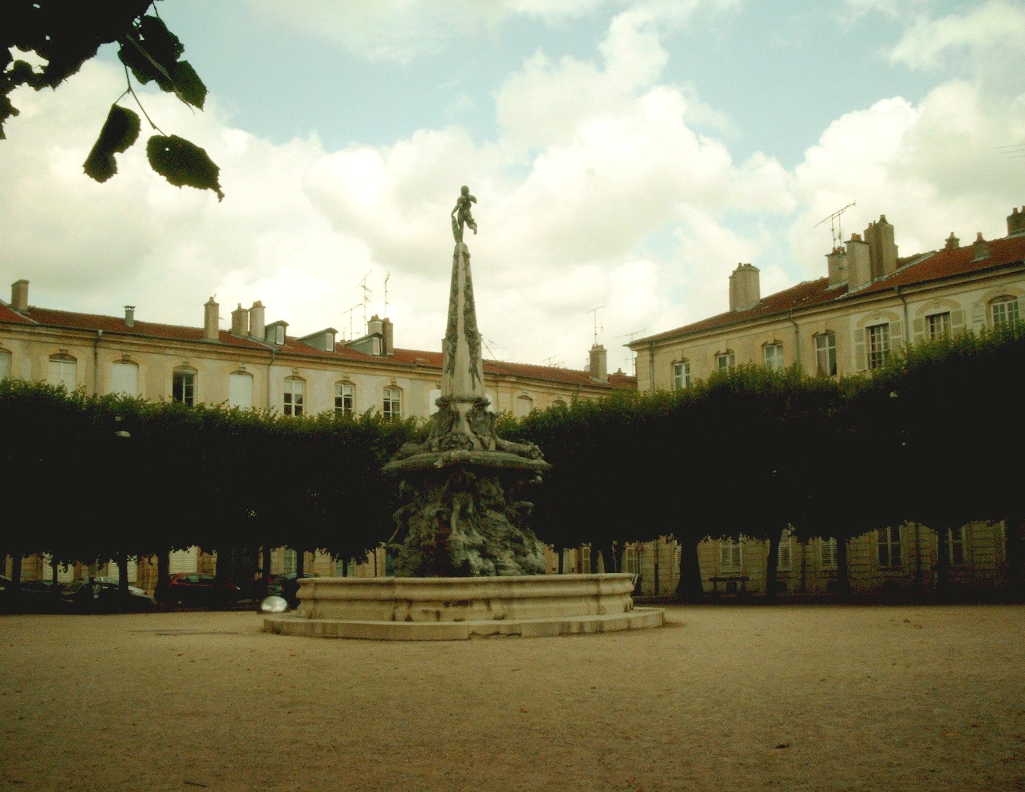 La place d'Alliance à Nancy This building is en partie classé, en partie inscrit au titre des Monuments Historiques. .